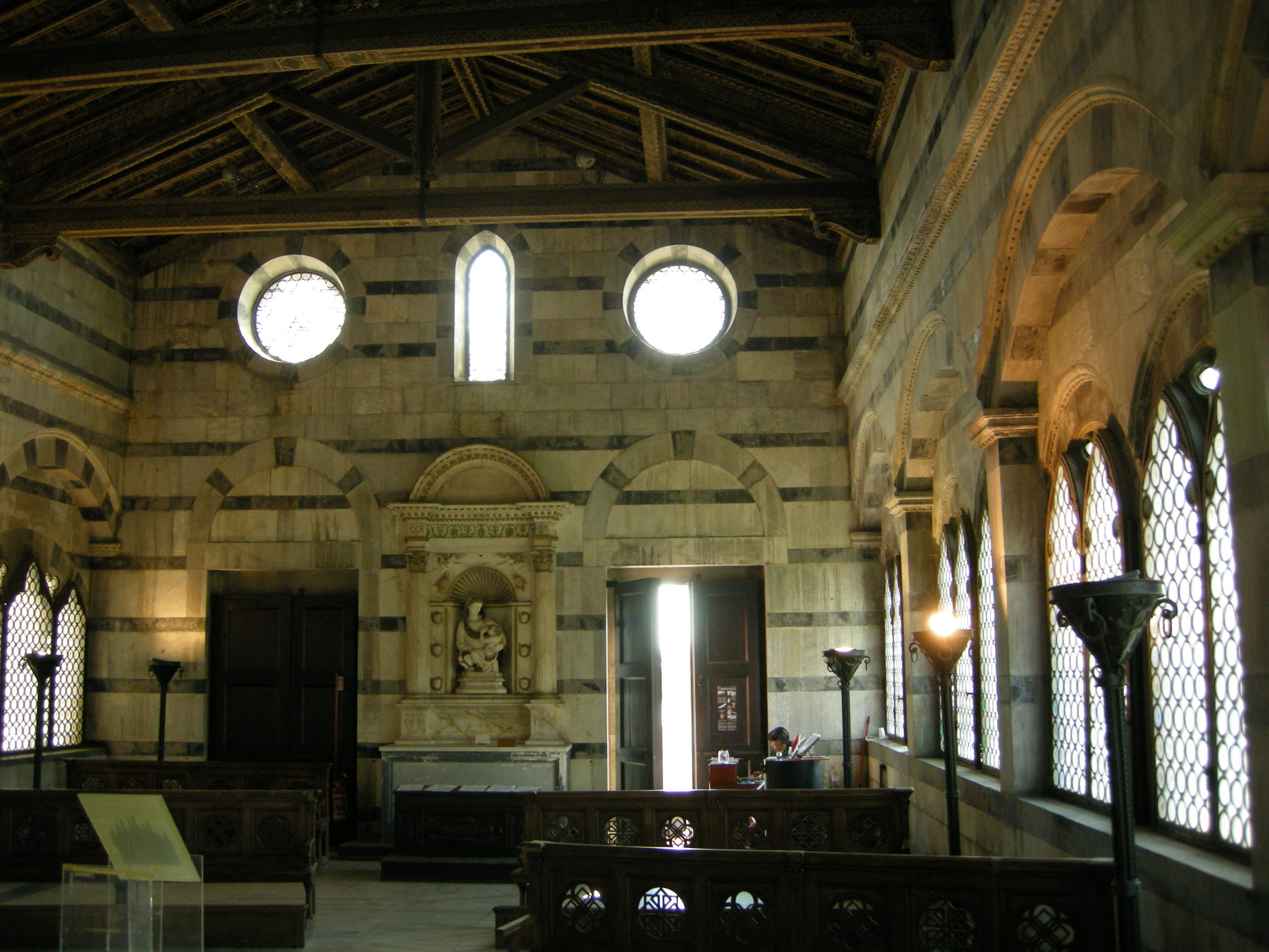 Santa maria della spina, interno